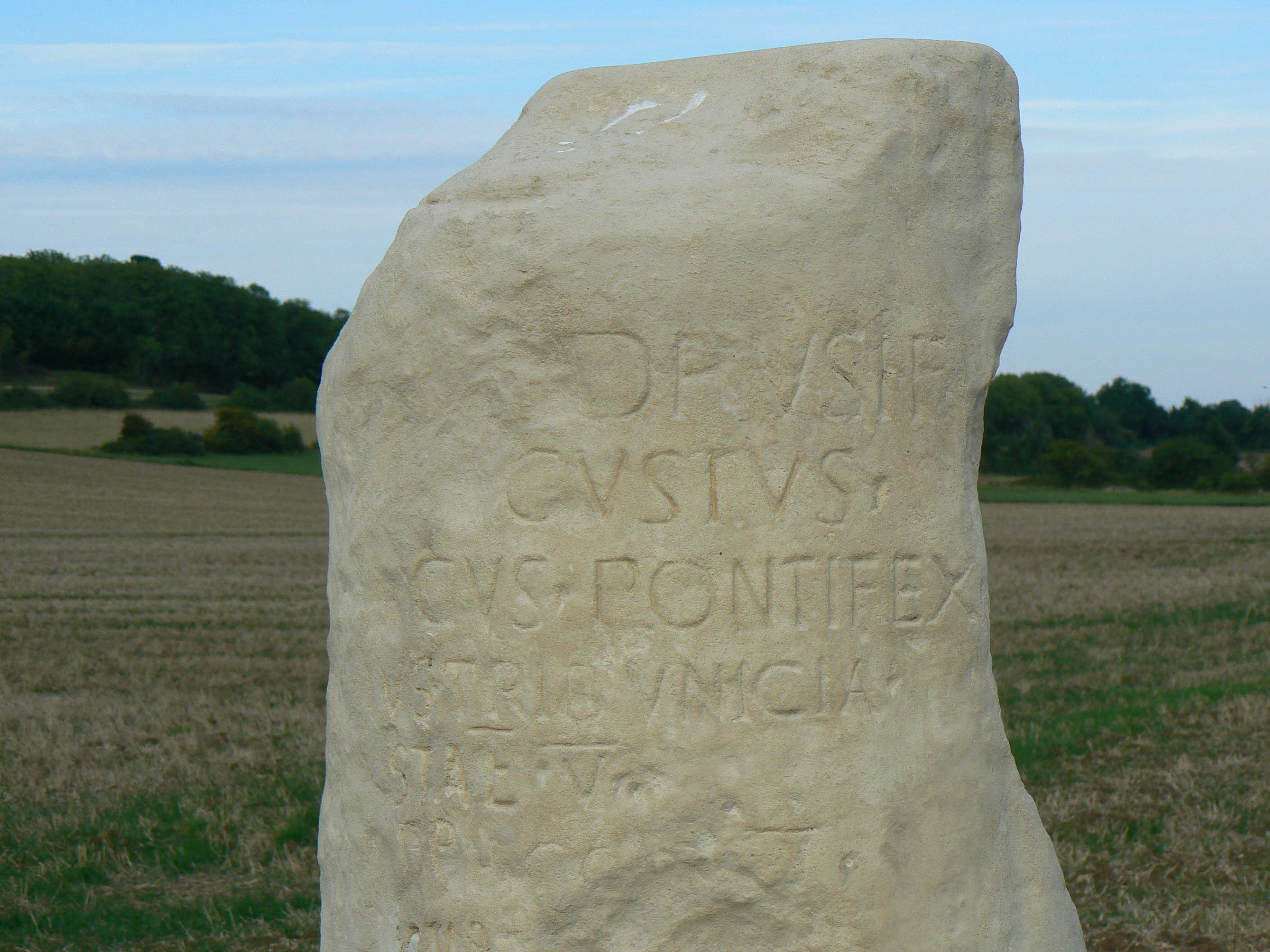 borne milliaire, époque de l'empereur Claude, Le Manoir, Calvados – Détail de l'inscription. CIL XVII2, 00449 = CIL XIII, 08976